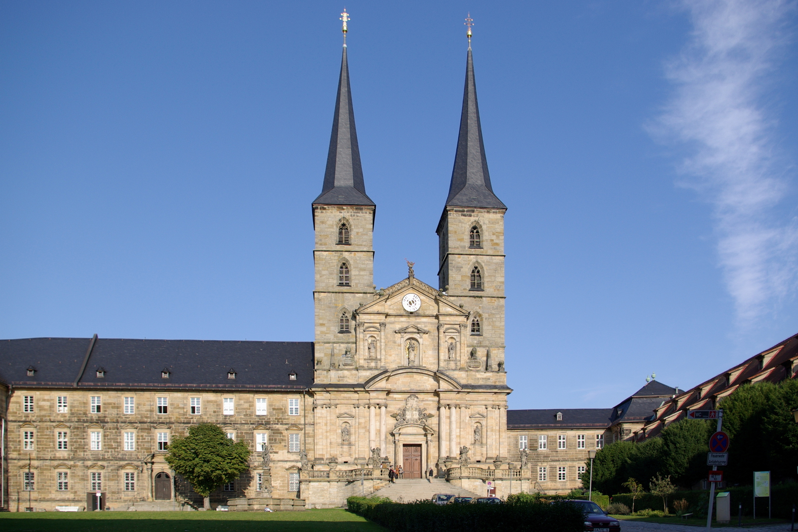 Bamberg, Michaelsberg